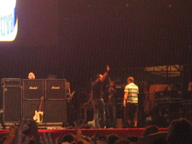 @ pacaembu - 18/09/2005